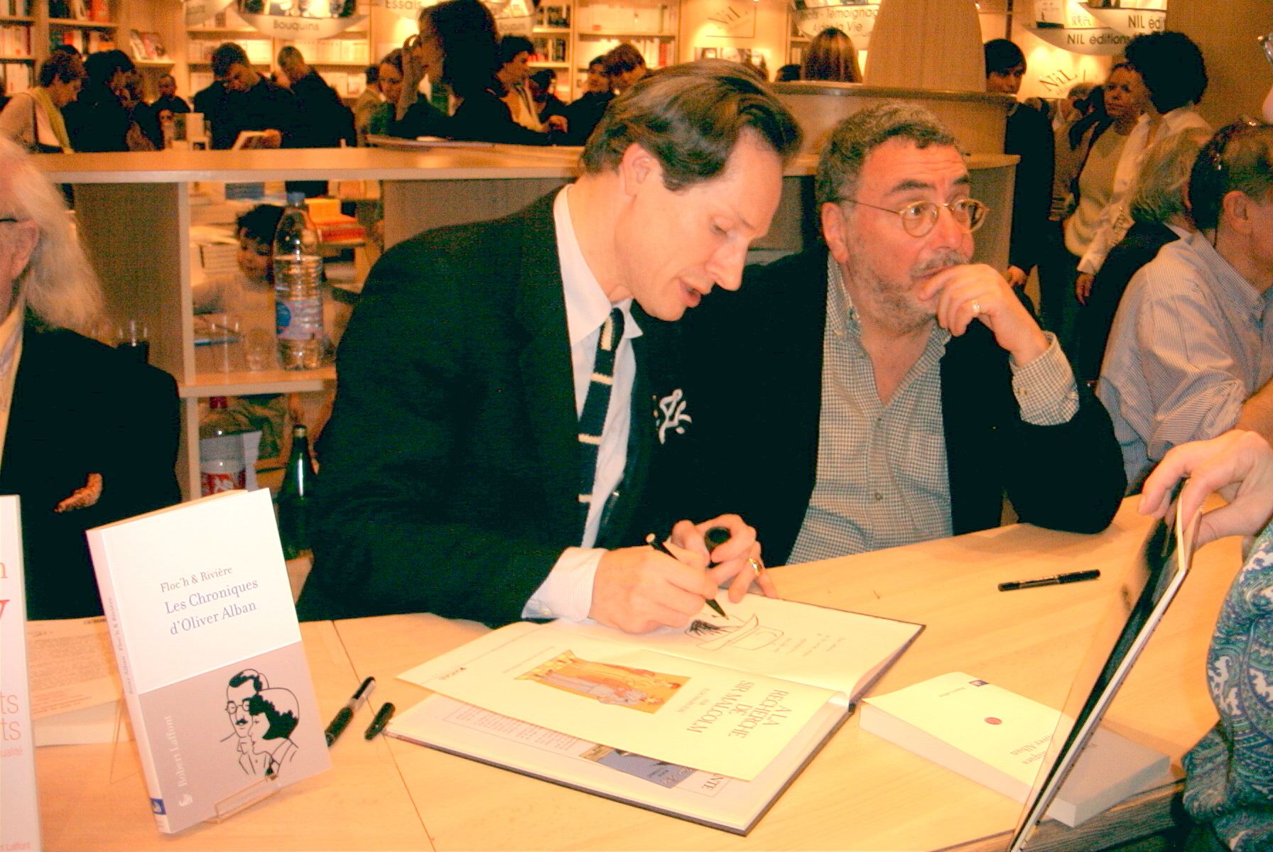 Floc'h et François Rivière au salon du livre de Paris, mars 2007